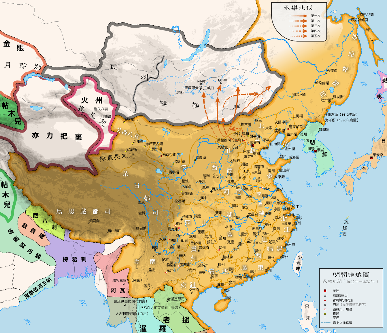 明朝